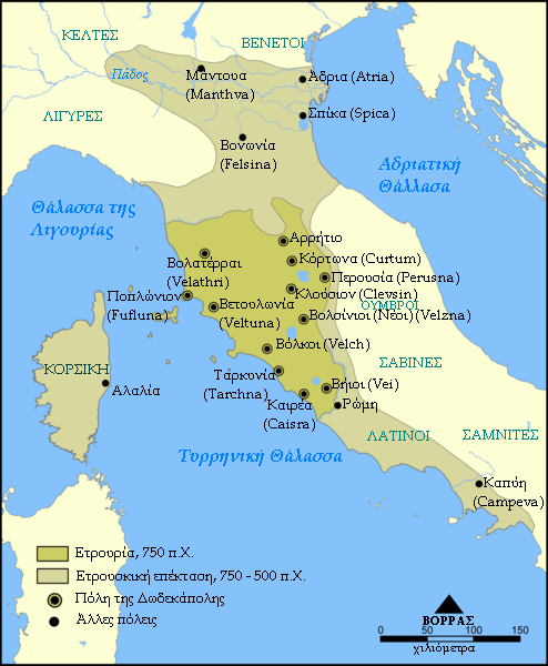 Χάρτης της Ετρουρίας